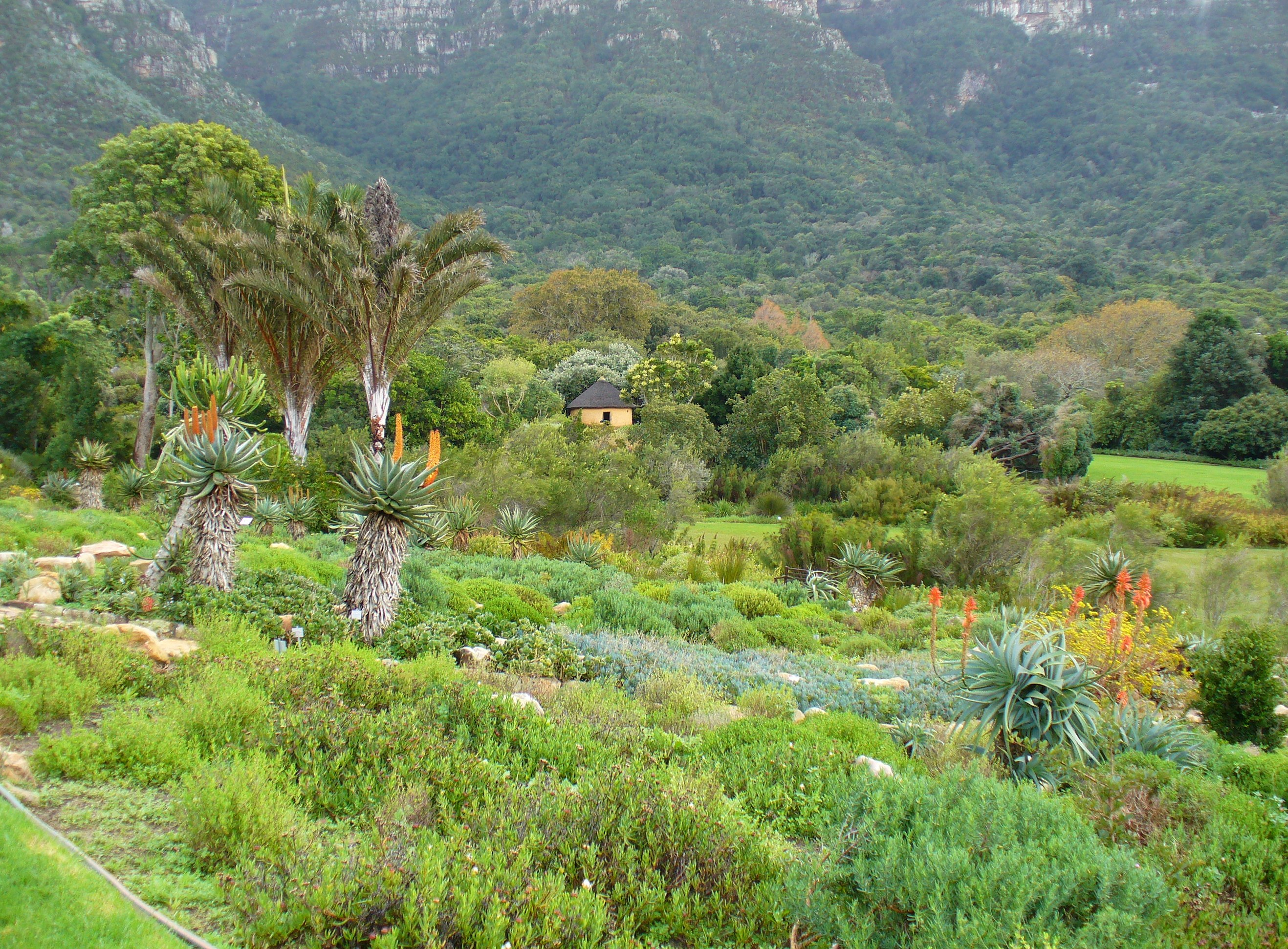 Kirstenbosch Gardens